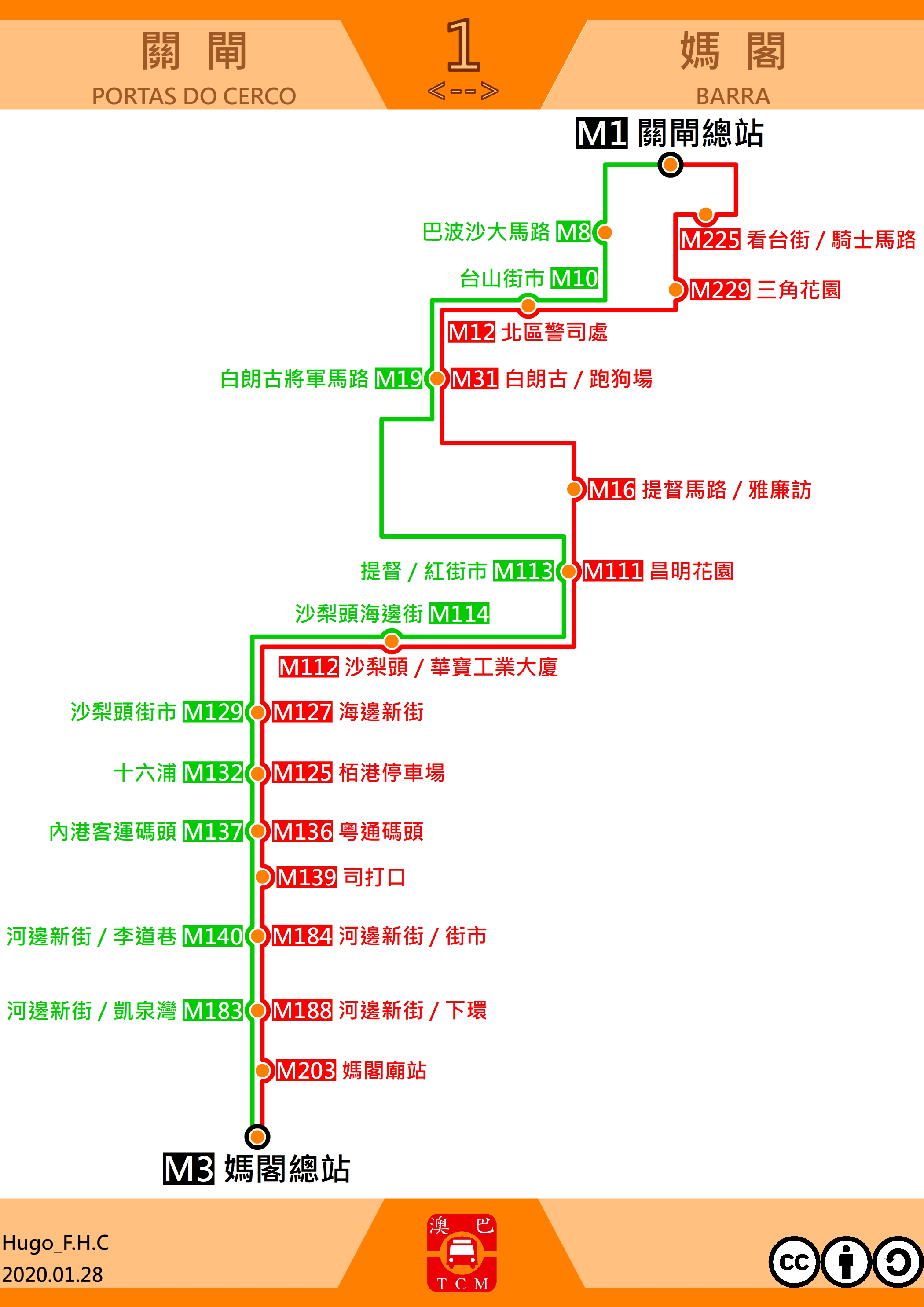 澳門巴士1走線圖